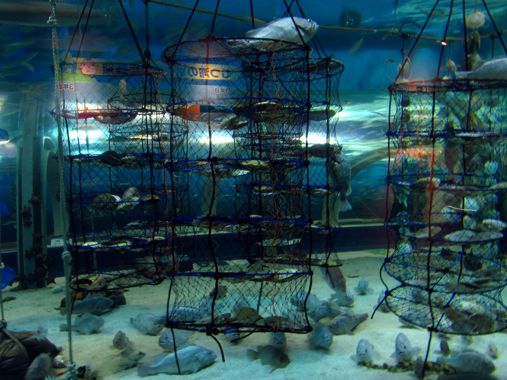 浅虫水族館展示 ホタテの養殖方法（陸奥湾の事例）